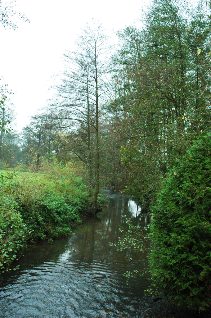 La Béthune à Mesnières-en-Bray